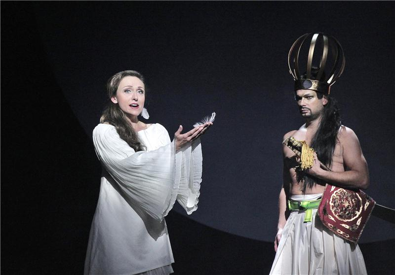 Olga Jelínková v titulní roli opery Igora Stravinského "Slavík". V roli Císaře Aleš Jenis. Národní divadlo Praha, režie Dominik Beneš, 2015.